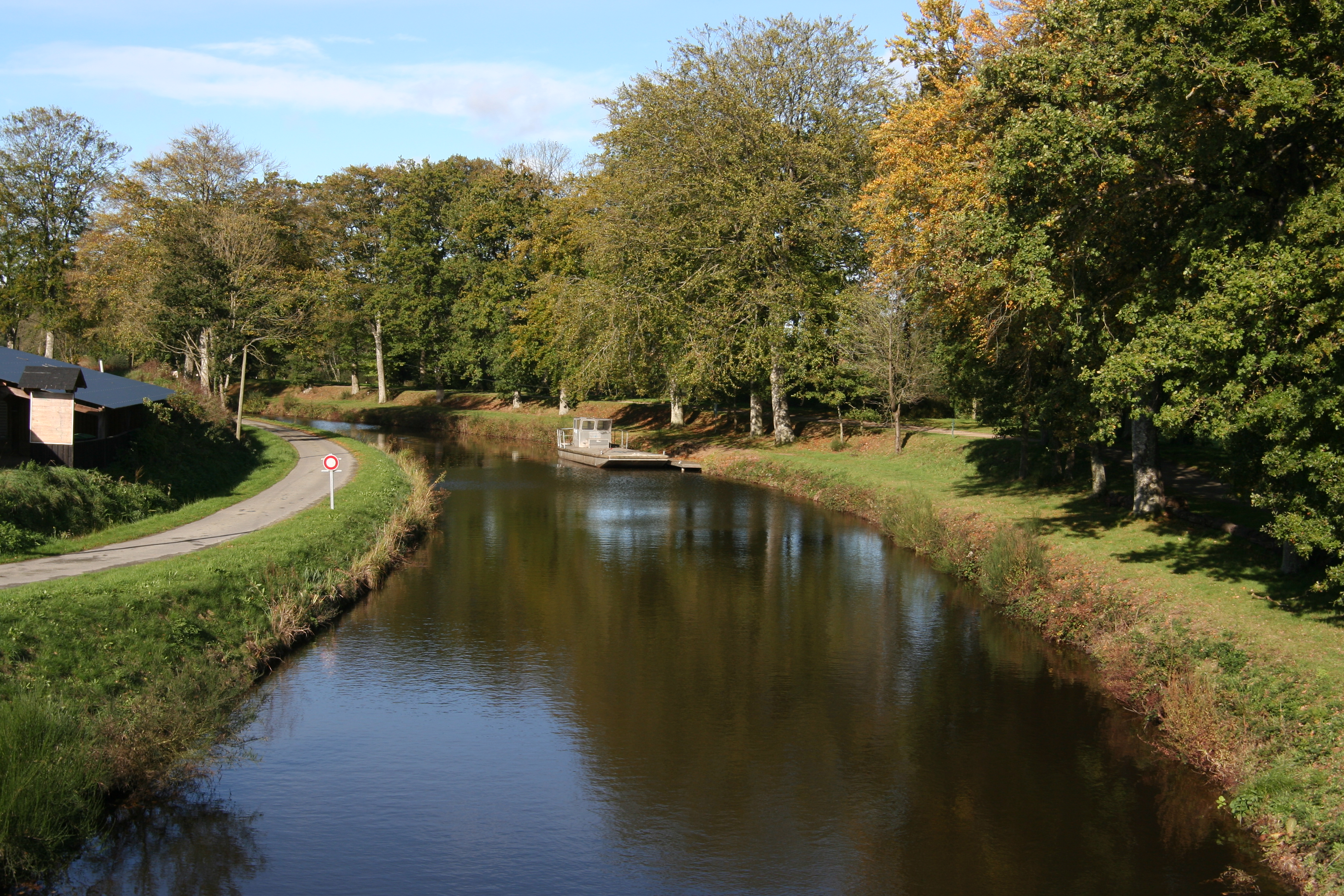 Le canal d'Ille-et-Rance à Chevaigné